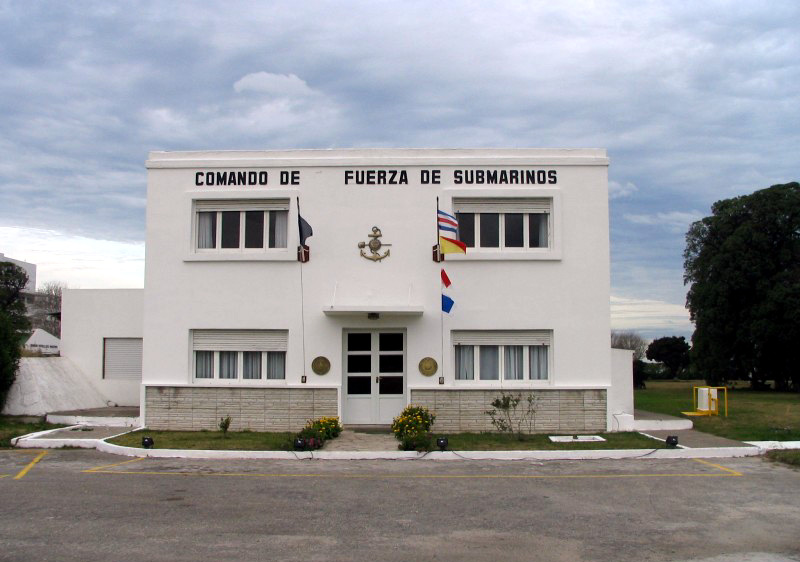 Comando de la Fuerza de Submarinos